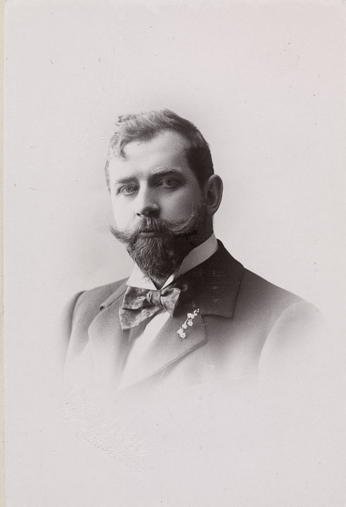 Haakon Ludvig Bergh - ca. 1900